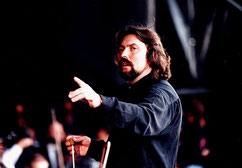 Dirigiert das ORF-Radio Symphonie Orchester.